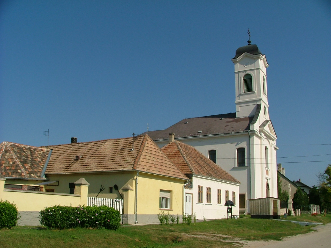 Bakonypéterd, Szent Péter és Szent Pál római katolikus templom This is a photo of a monument in Hungary, Identifier: 3992